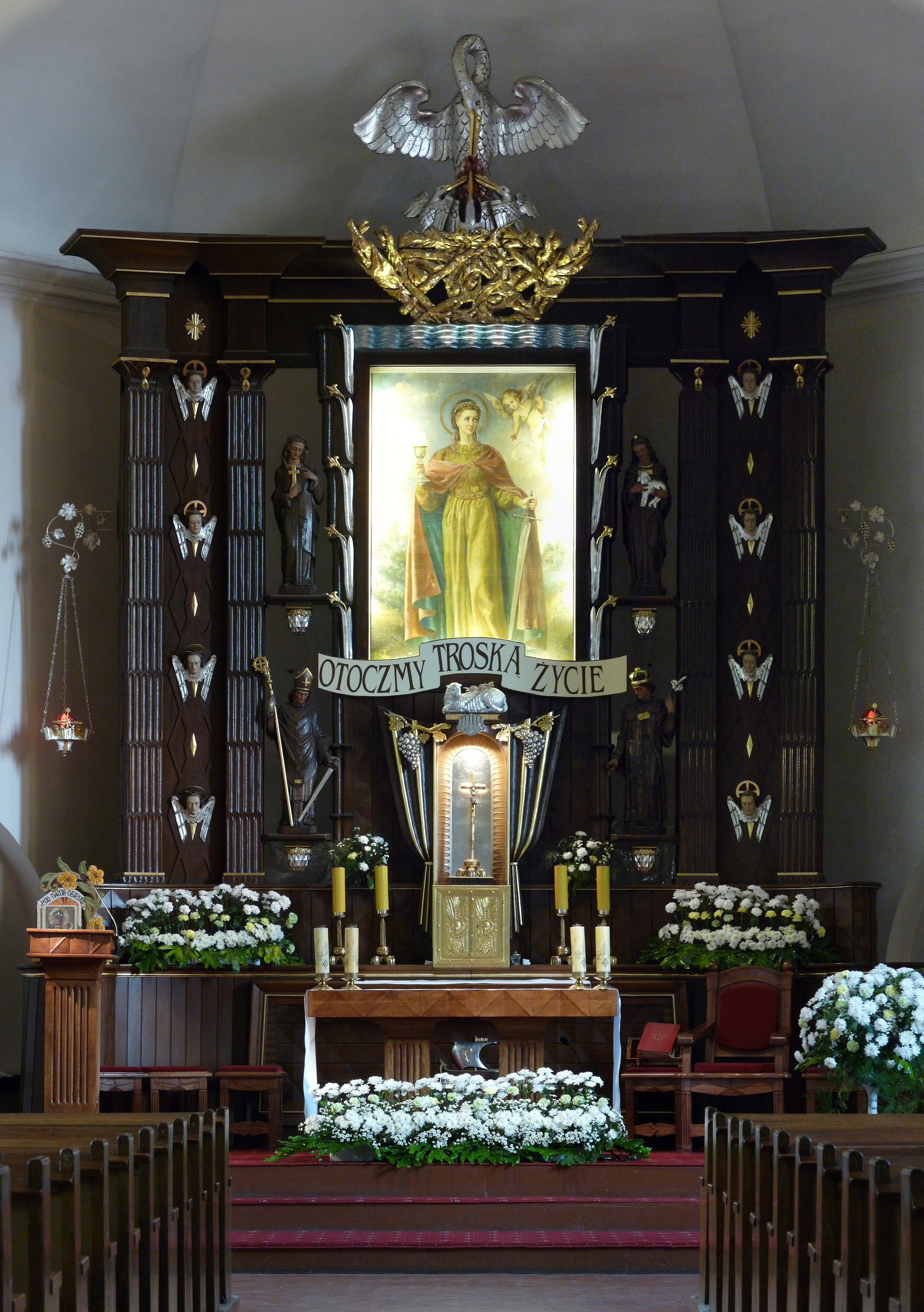 Ołtarz główny kościoła św. Barbary w Luboniu